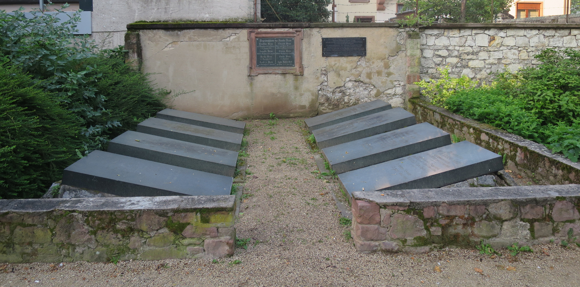 Grabstätte der Familie des Pfarrers Eduard Keim